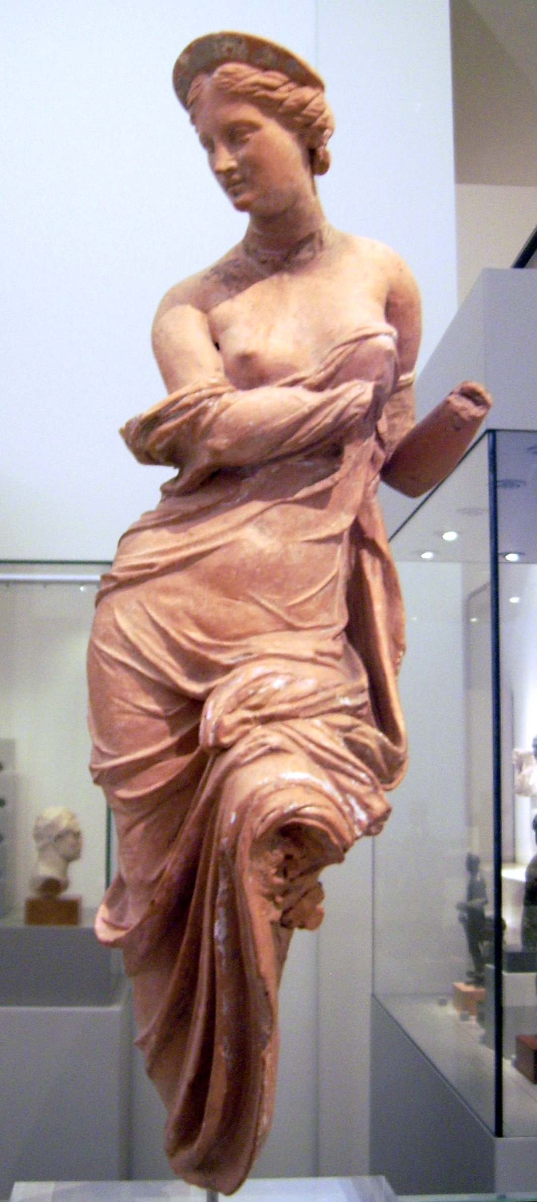 Tonfigur der Aphrodite; 2. Jh. v. Chr., aus Kleinasien, 1930 für die Antikensammlung Berlin aus der Sammlung Heil erworben, Höhe 37,6 cm, wenige Farbspuren, Inventarnummer 31272